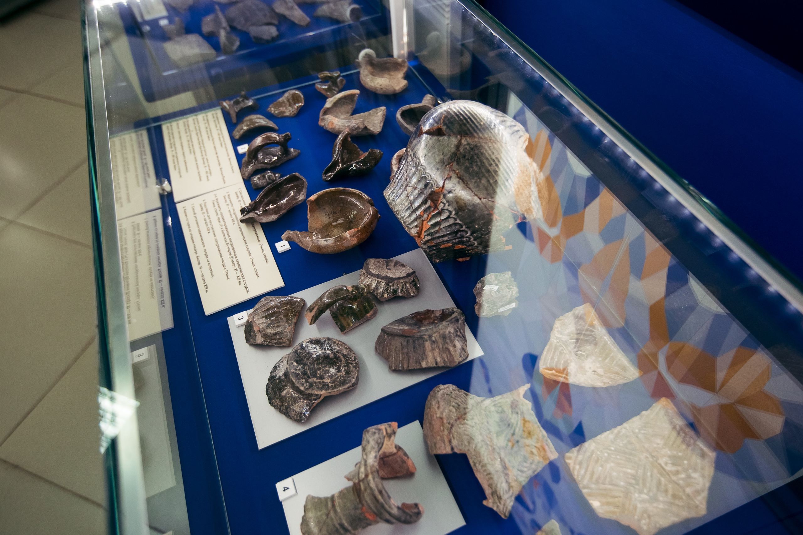 Татарча/tatarça: Тарихи-археологик музее эчендә